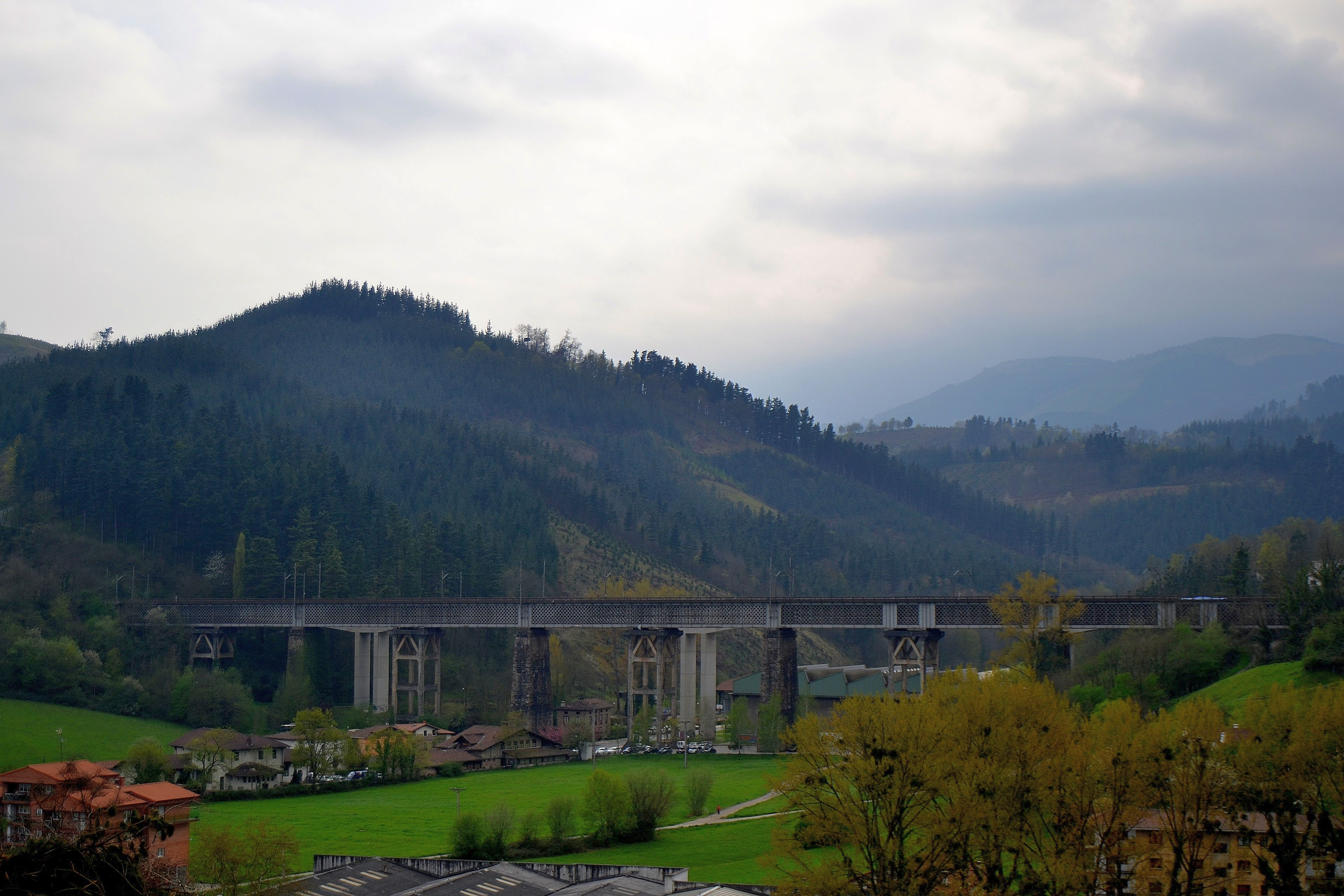 Ormaiztegiko zubia. Gipuzkoa, Euskal Herria. Bridge of Ormaiztegi. Gipuzkoa, Basque Country.